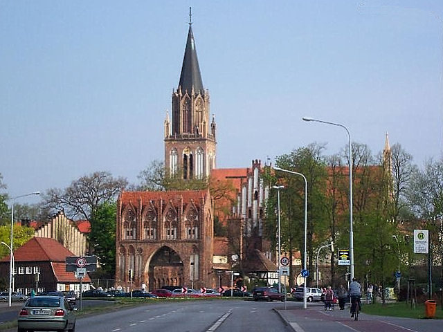 Neubrandenburg, Stargarder Tor und Marienkirche